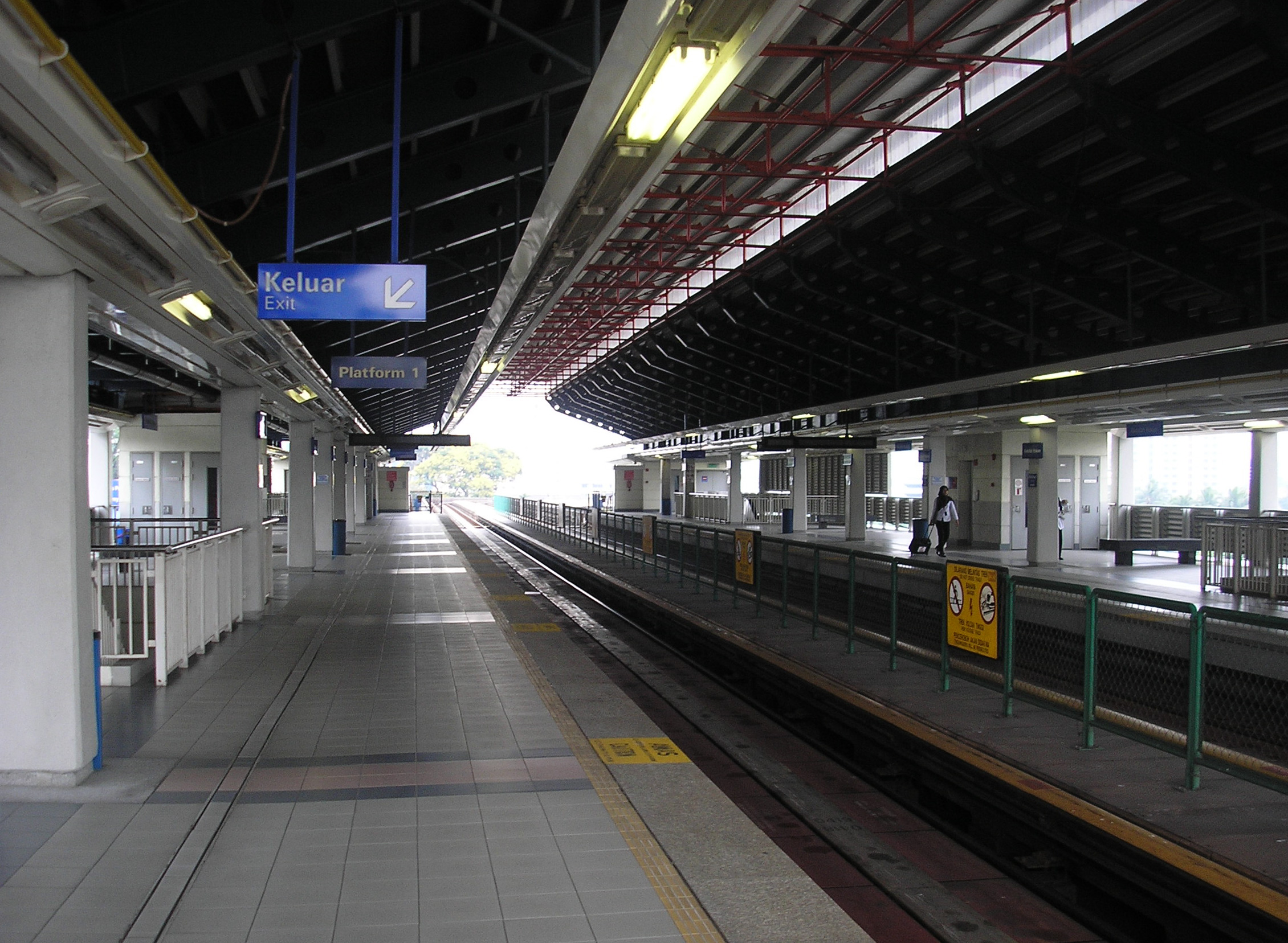 The Abdullah Hukum LRT station (Kelana Jaya Line), Kuala Lumpur, Malaysia.